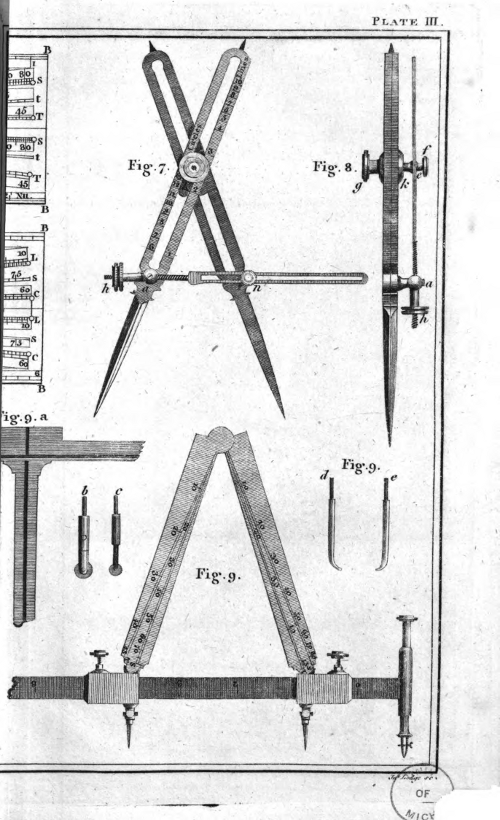 Abbildung aus dem Buch von George Adams: Geometrische und graphische Versuche, 1795